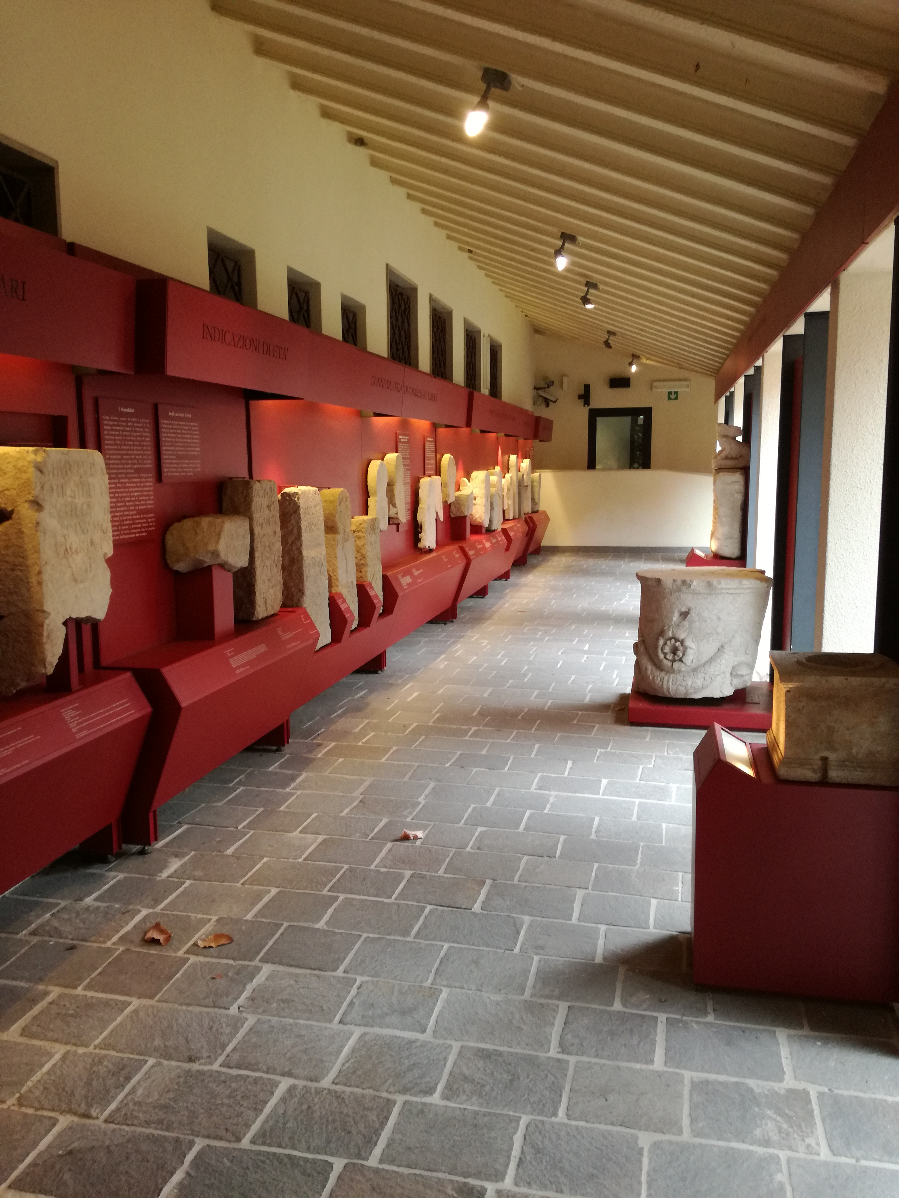 Lapidario romano situato all'interno del Museo Archeologico Nazionale di Adria